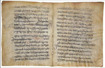 იერუსალიმური ლექციონარი